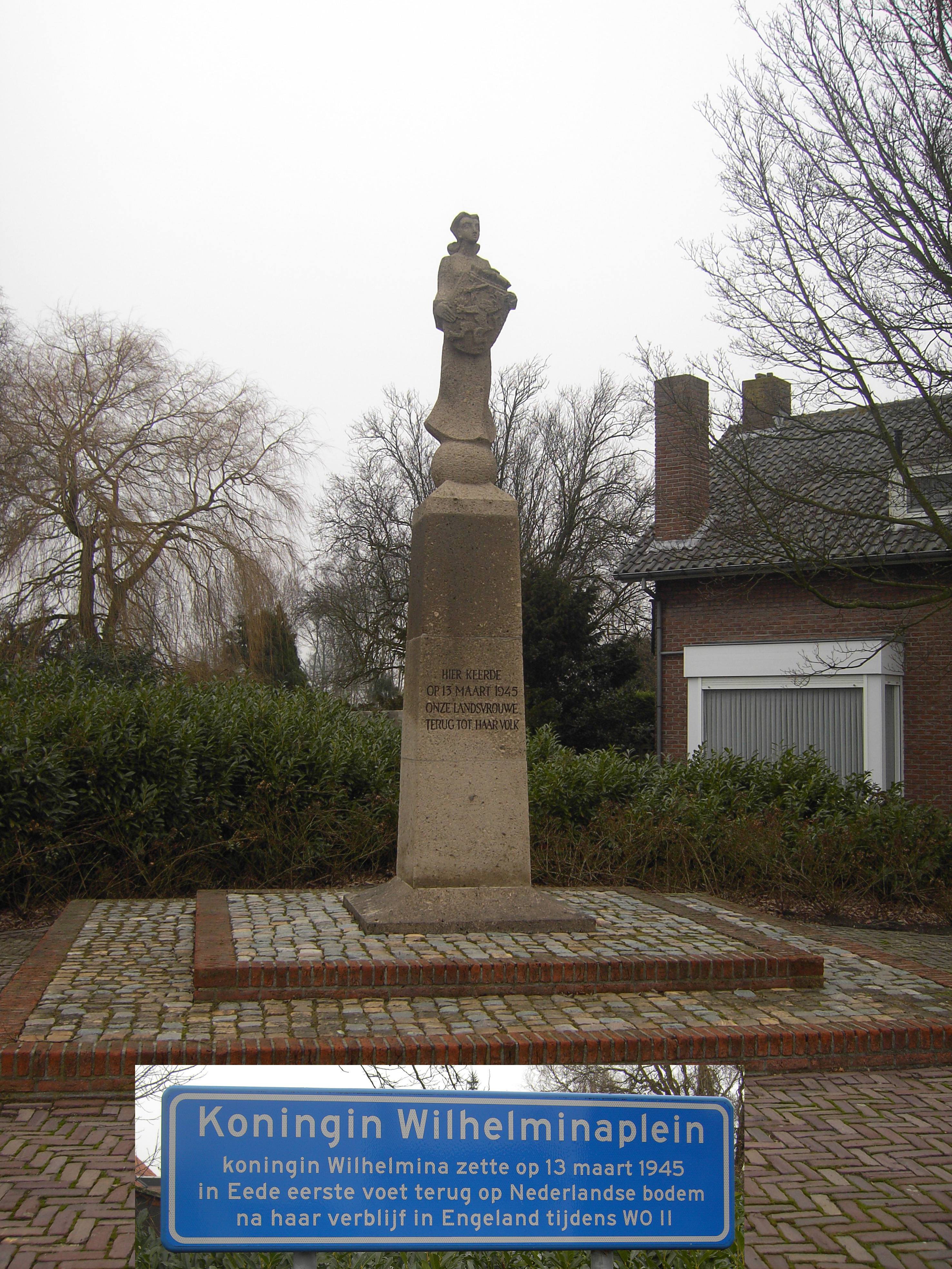 Eede - Sluis - Zeeland - Zeeuws Vlaanderen - Nederland